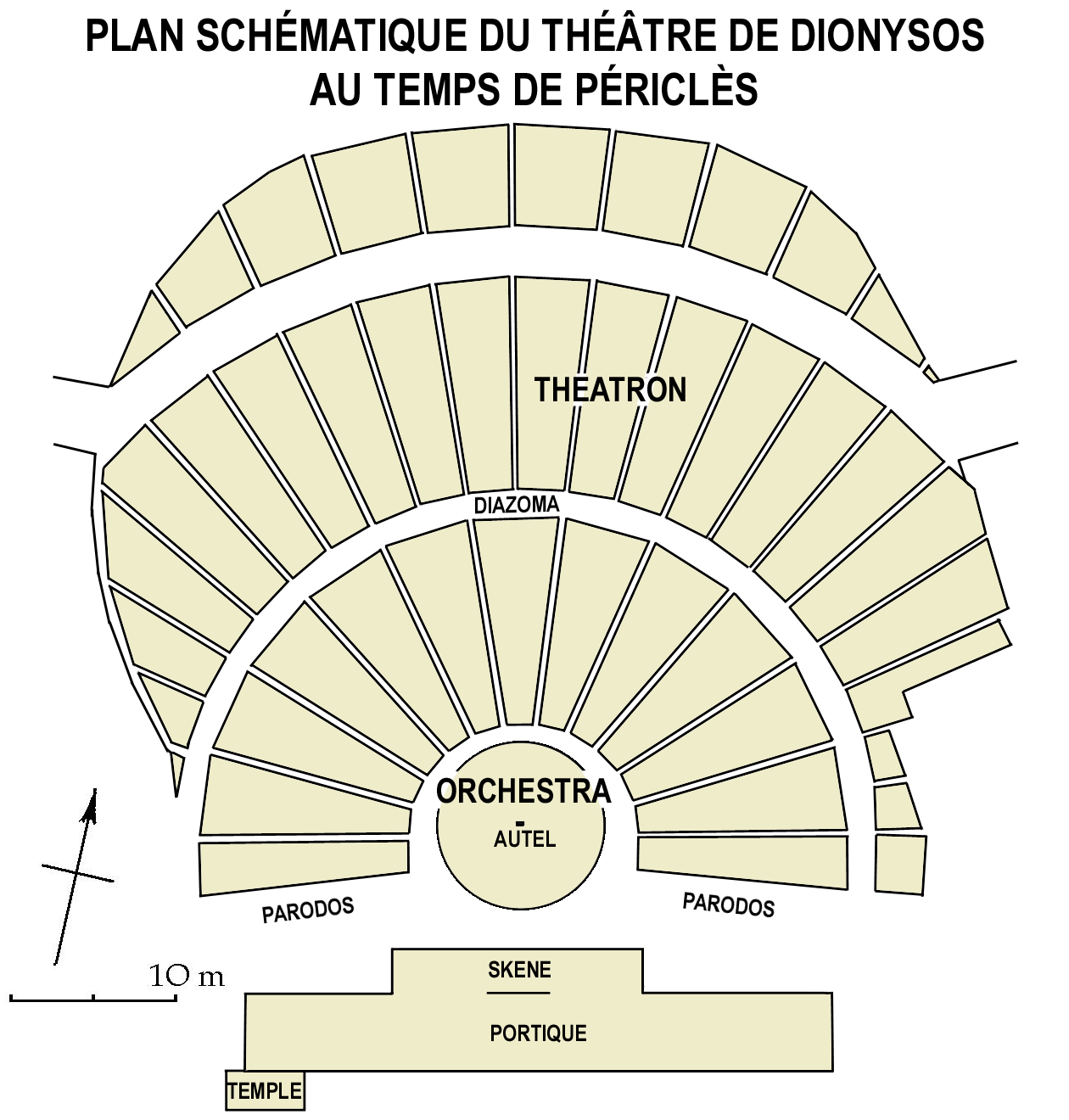 Plan schématique du théâtre de Dionysos à Athènes, à l'époque de Périclès (Ve s. avant J.C.). D'après Image:Dionysus-theater.JPG, HC Baldry (Le théâtre tragique des Grecs, p.60), Paul Demont & Anne Lebeau (Introduction au théâtre grec antique, p.45). Le théâtre actuel (dessin des gradins) date pour l'essentiel de l'époque romaine. La reconstitution du théâtre antérieur est très hypothétique : les gradins inférieurs étaient alors au mieux en bois, tandis que la plupart des spectateurs s'installaient sur la pente naturelle.